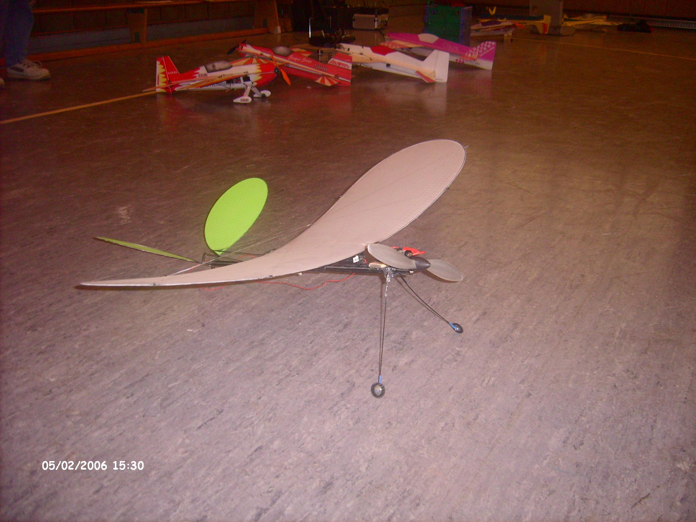 Description : Braun Modelltechnik, Stubenfliege, Sporthalle Bundespolizei Mitte, 5. Feb 2006 Source : Michael Date : 2006-02-05 Photograph : Michael